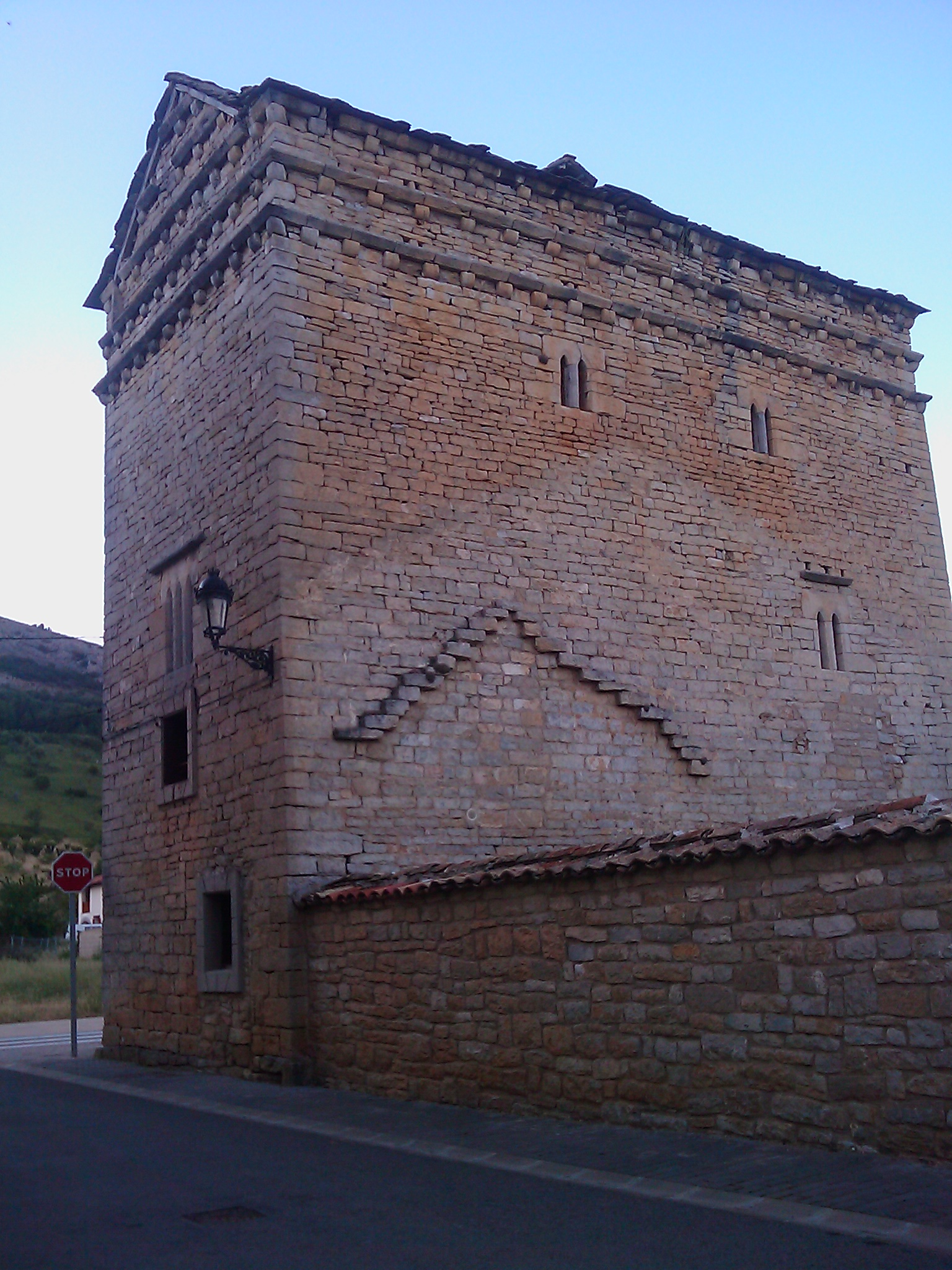 Etxauriko Otazu dorretxea.